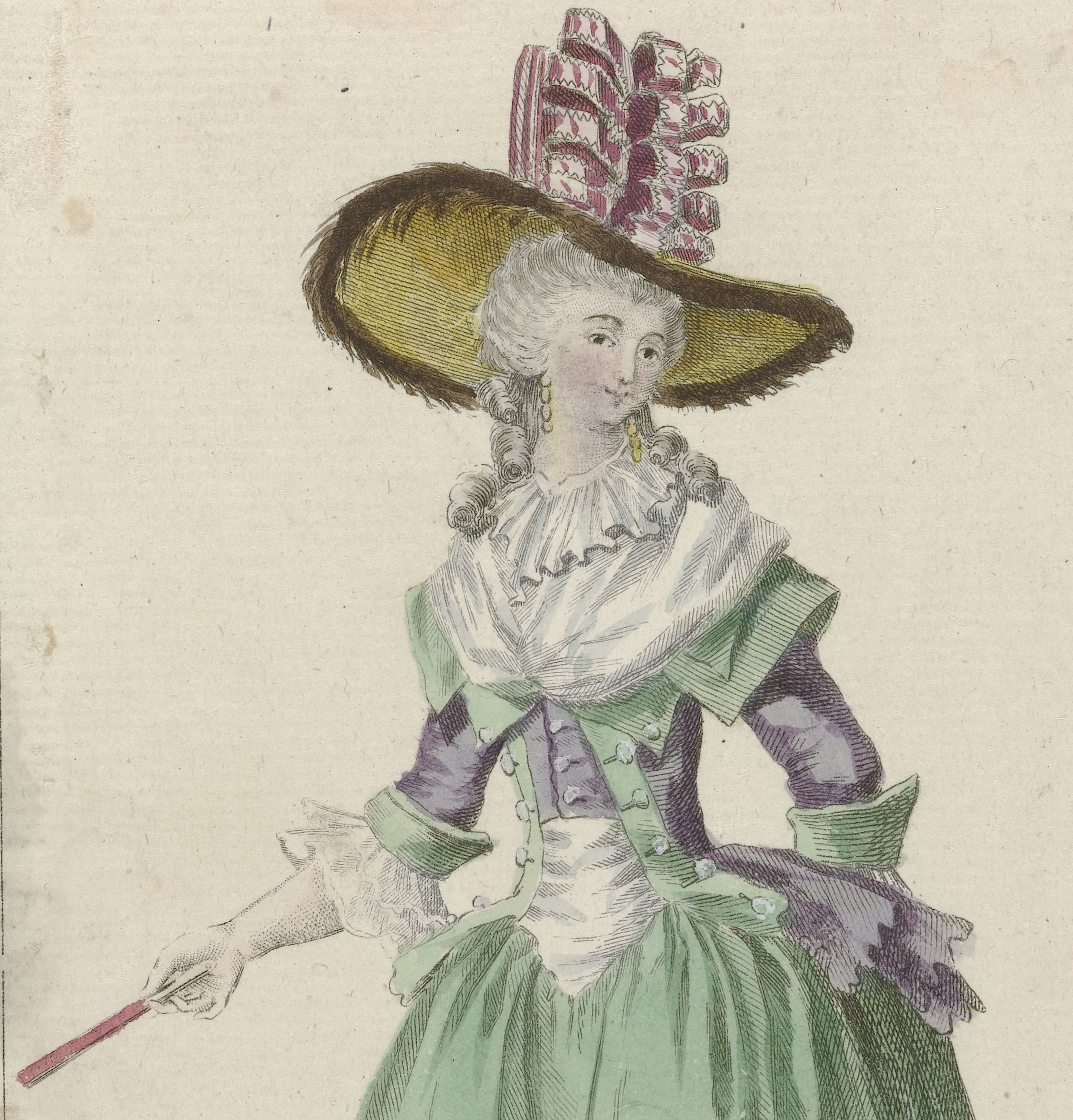 IdentificatieTitel(s): Cabinet des Modes ou les Modes Nouvelles, 1 octobre 1786, Pl. IObjecttype: modeprent Objectnummer: RP-P-2009-2191Omschrijving: Vrouw in een paarse 'caraco à la Cauchoise' met appelgroene kraag en revers op een bijpassende rok met sleepje. Geplooide kraag en manchetten. Accessoires: hoge hoed afgezet met bont en versierd met lint, oorbellen, fichu, waaier, schoenen. De prent maakt deel uit van het 22e Cahier uit Cabinet des Modes ou les Modes Nouvelles. De serie bestaat uit 72 modeprenten, uitgegeven door Buisson, Parijs, 15 november 1785 - 1 november 1786.VervaardigingVervaardiger: prentmaker: A.B. Duhamel (vermeld op object)naar tekening van: Claude Louis Desrais (vermeld op object)uitgever: BuissonPlaats vervaardiging: ParijsDatering: 1786Fysieke kenmerken: gravure, met de hand gekleurdMateriaal: papier Techniek: graveren (drukprocedé) / met de hand kleurenAfmetingen: blad: h 184 mm × b 112 mmOnderwerpWat: fashion plateshead-gear: hat (+ women's clothes)clothing for the upper part of the body (CARACO) (+ women's clothes)fan (+ women's clothes)skirt (+ women's clothes)ear-rings (+ women's clothes)shoes, sandals (+ women's clothes)piece of clothing covering the breast or décolleté (FICHU) (+ women's clothes)Wanneer: 1786-10-01 - 1786-10-01Verwerving en rechtenCredit line: Aankoop uit het F.G. Waller-FondsVerwerving: aankoop 2009Copyright: Publiek domein